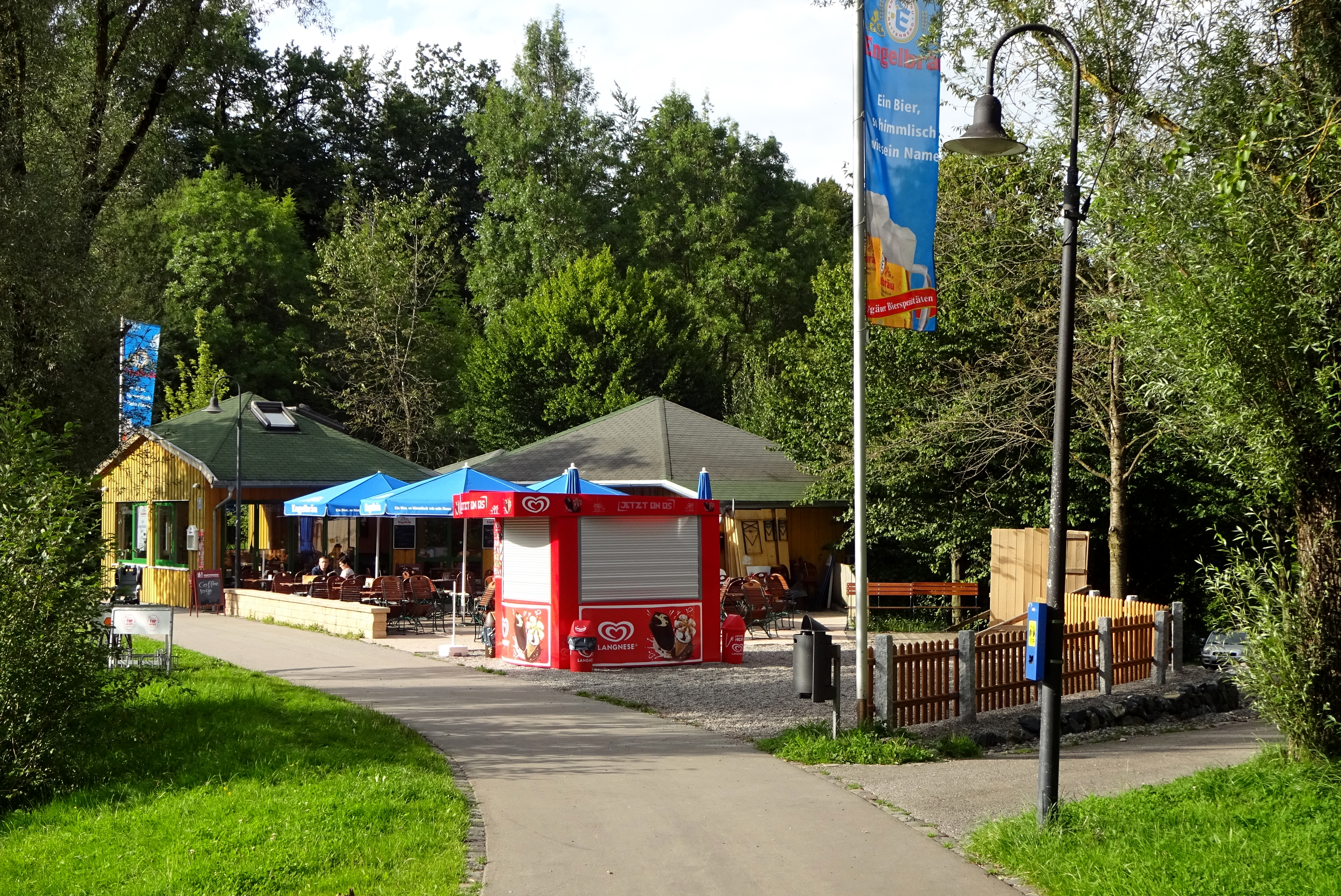 August 2014